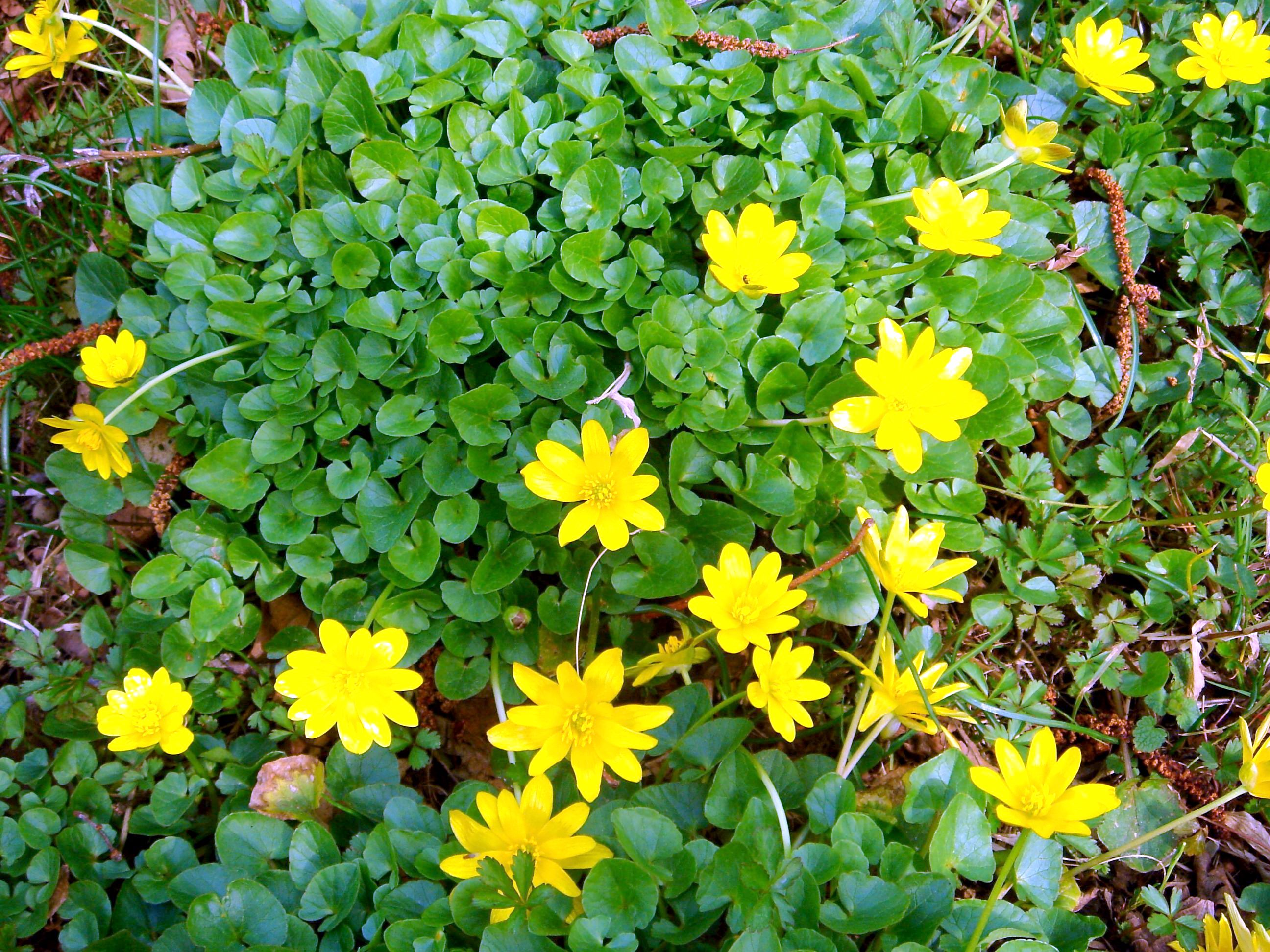 Ranunculus ficaria